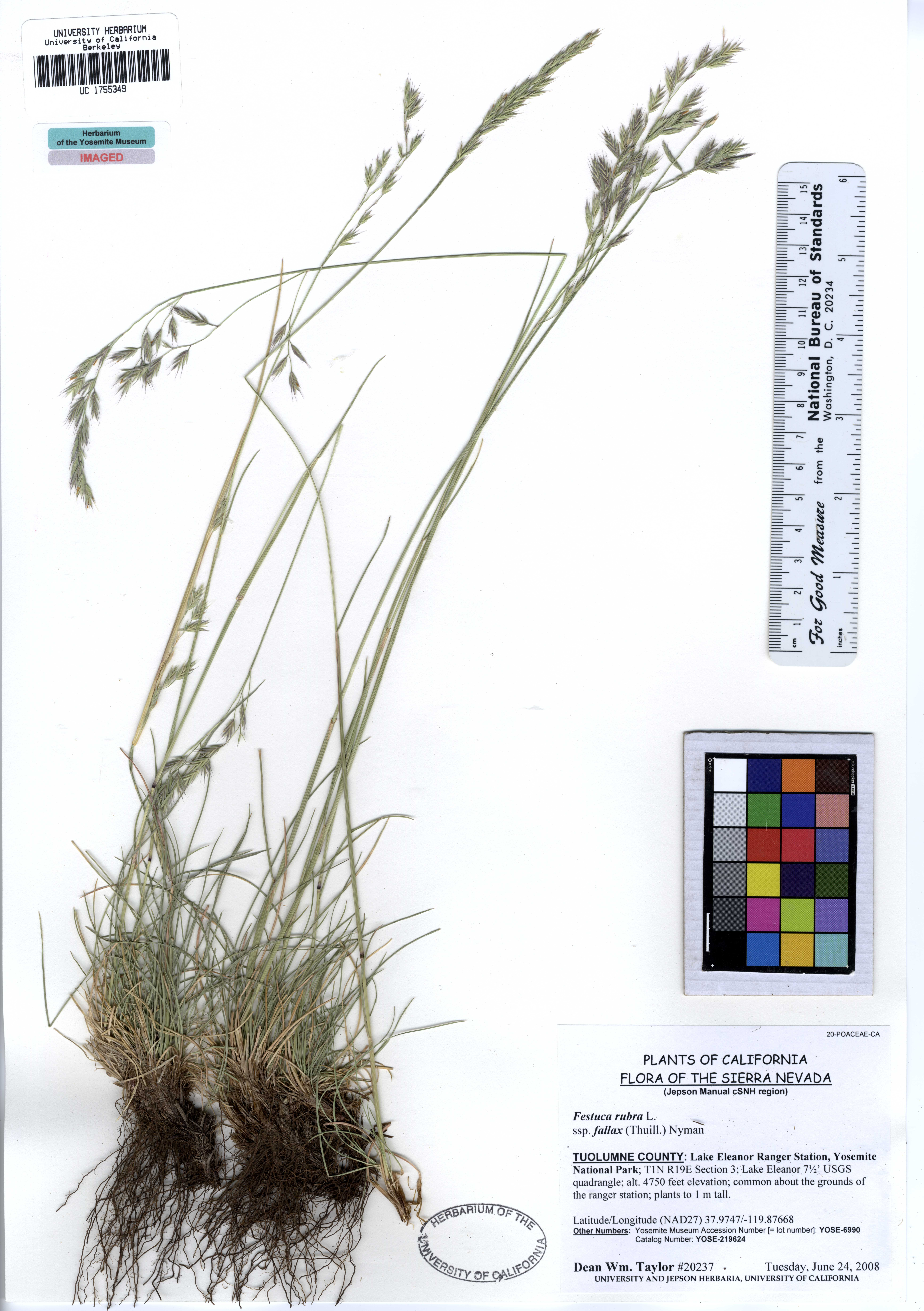 UC1755349 Festuca rubra ssp. fallax